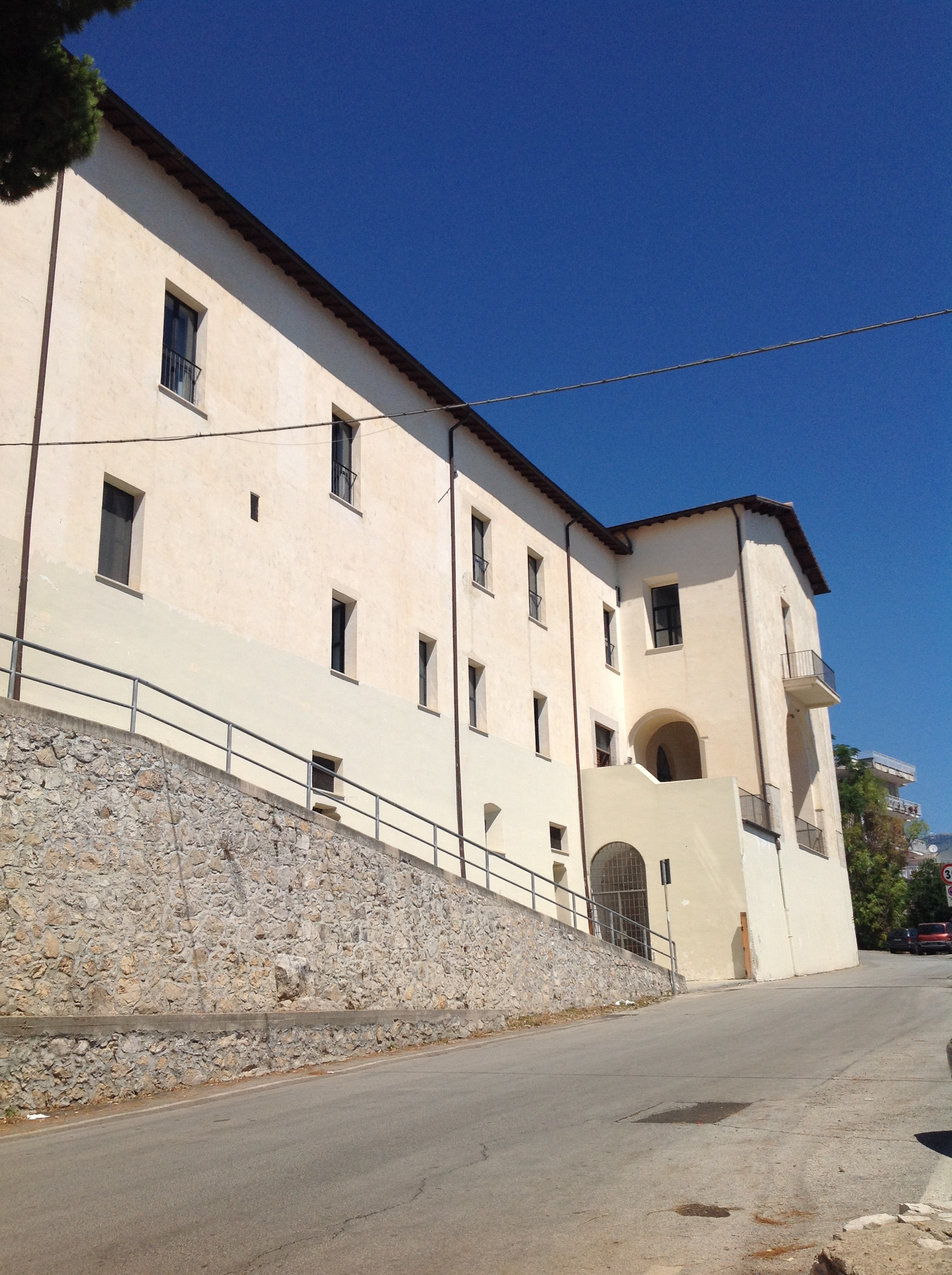 La facciata esterna dell'ex convento dei Cappuccini in Gaeta.